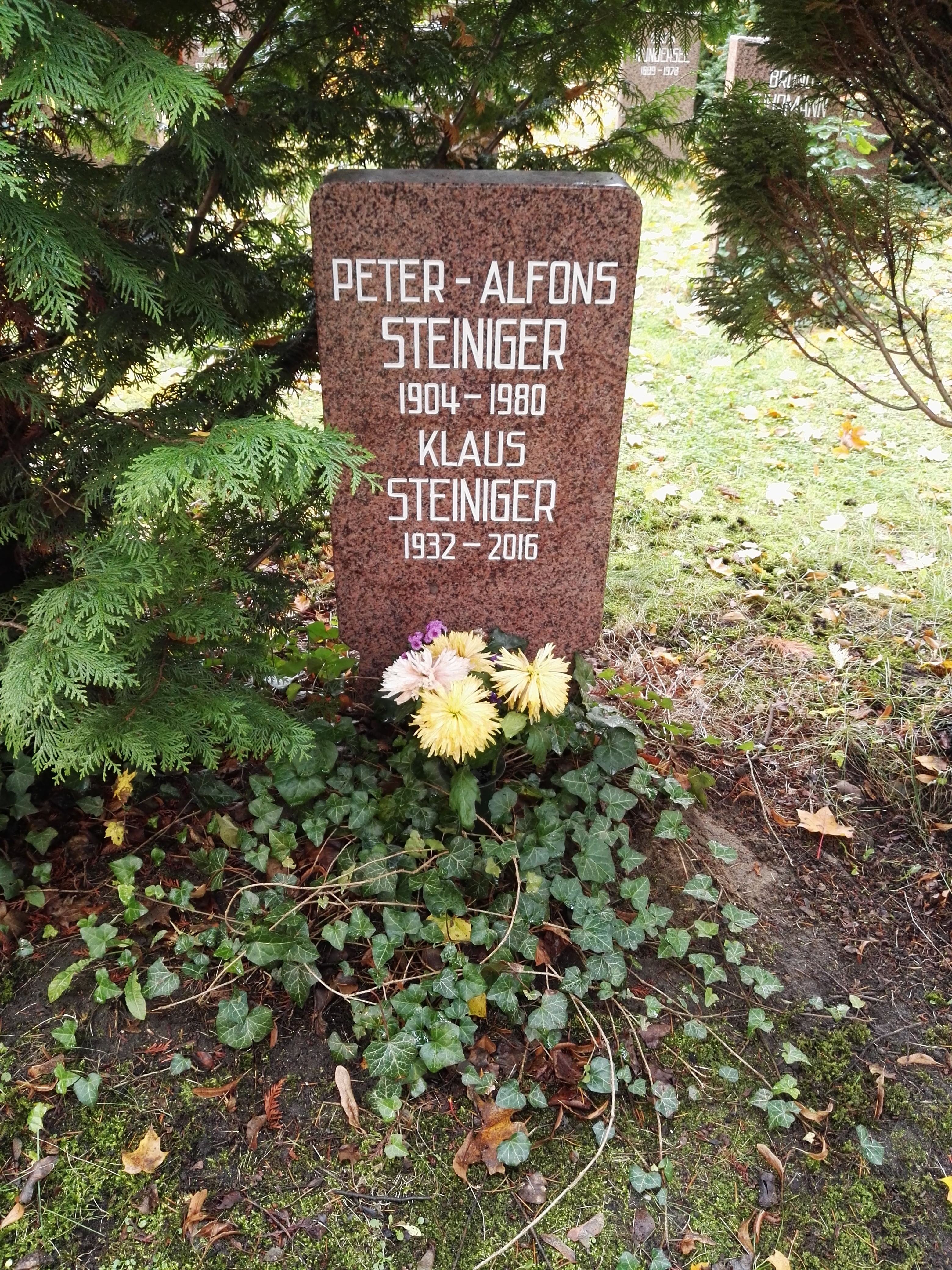 Grab von Peter Alfons Steiniger und Klaus Steiniger auf dem Sozialistenfriedhof des Zentralfriedhofs Friedrichsfelde